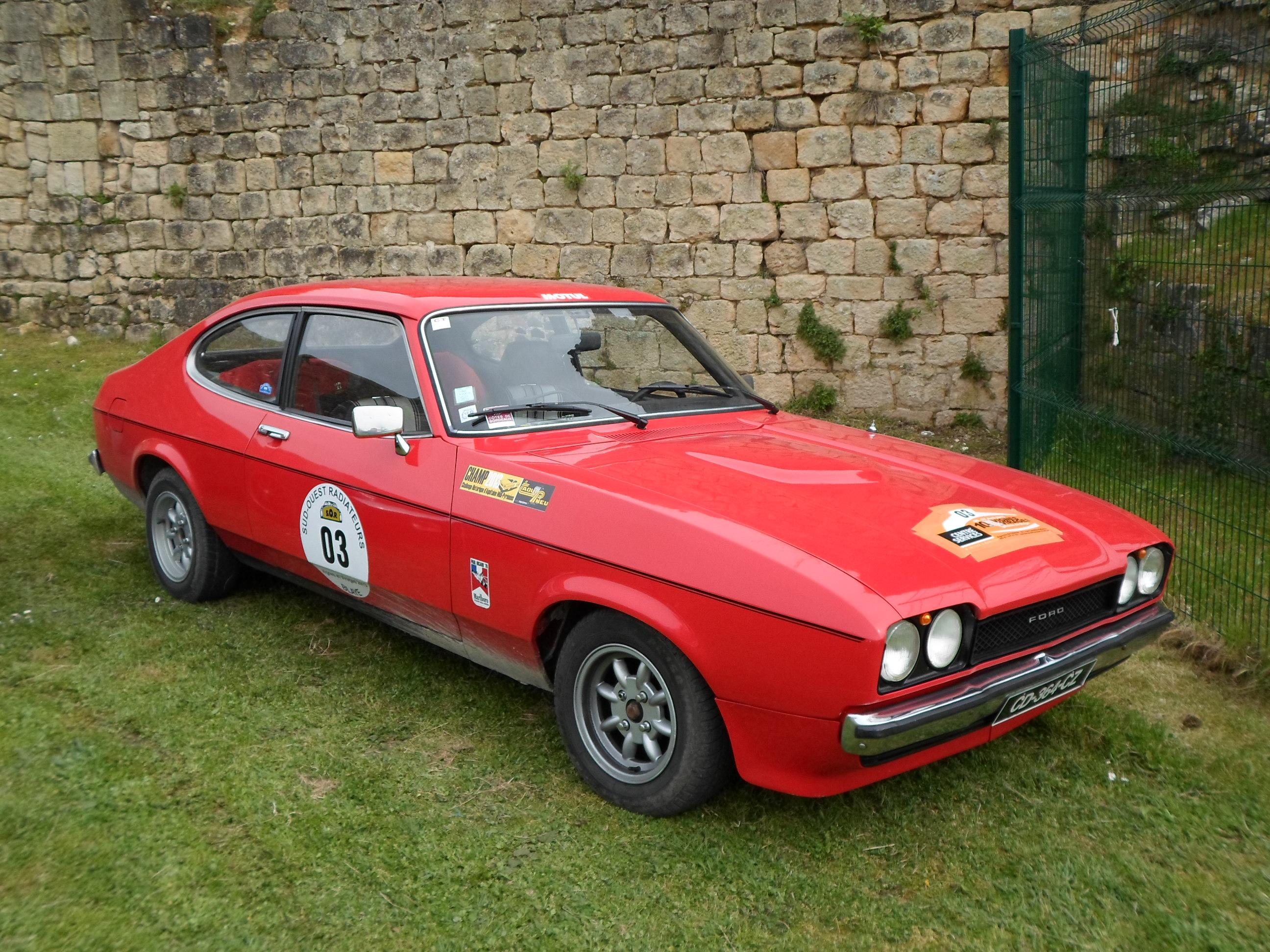 Ford Capri Blaye 2013